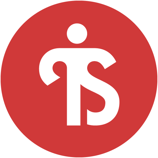 Tyrilis offisielle symbol